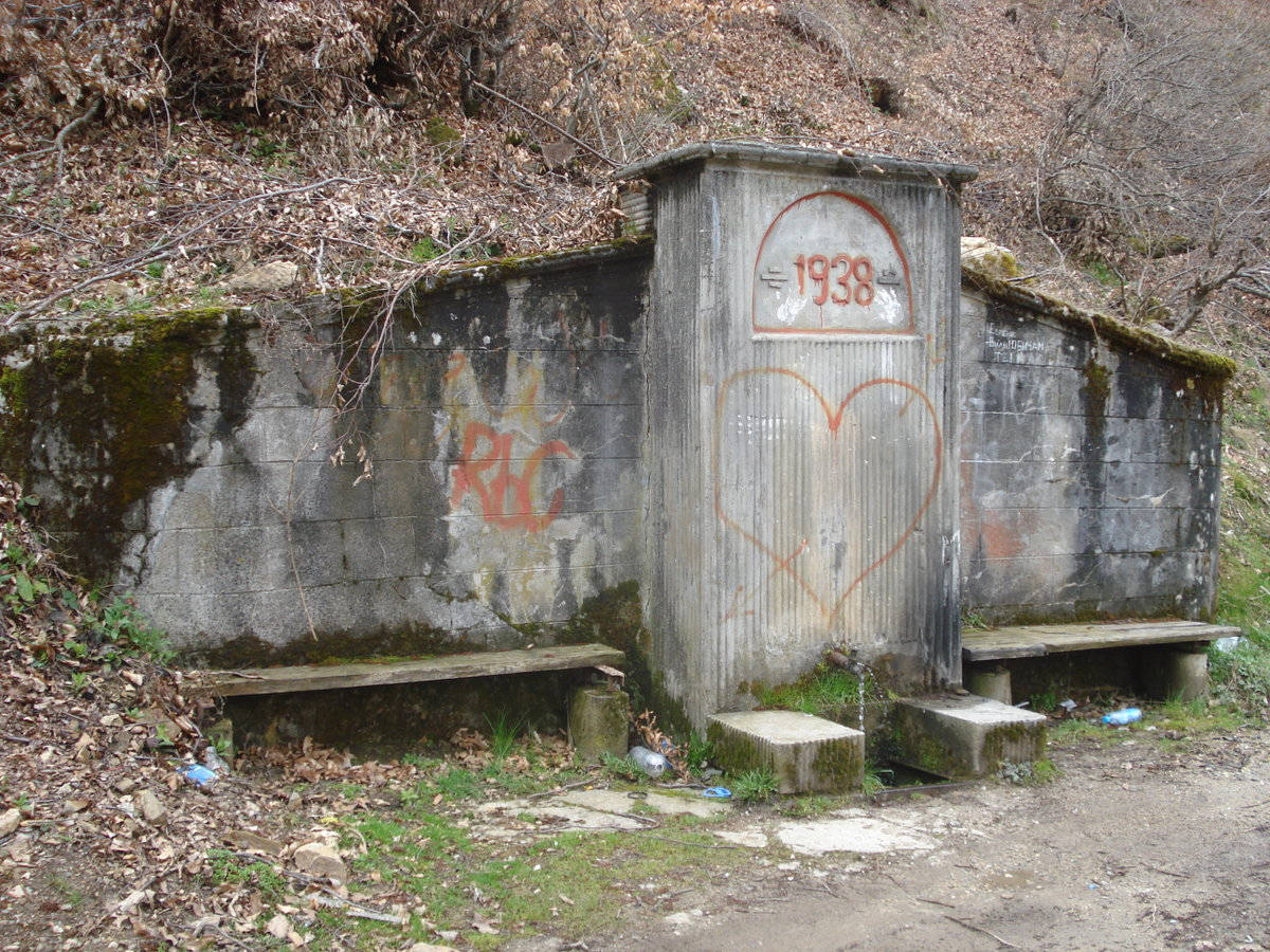 Любовната чешма в Рудозем.